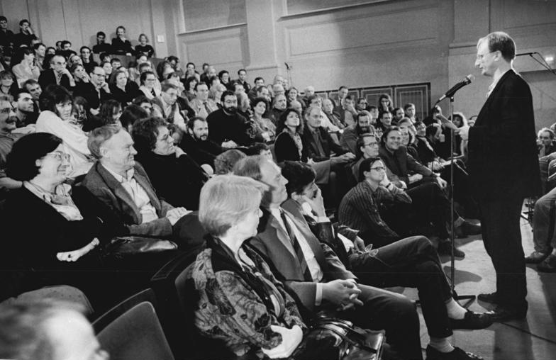 ADN-ZB Uhlemann 22.12.1989 Berlin: Diskussion Künstler, Wissenschaftler und Kulturpolitiker aus der DDR, der BRD und Berlin (West), trafen sich im Plenarsaal der Akademie der Künste, zu einem Gespräch über ihre Erfahrungen, Hoffnungen und Befürchtungen. Auch Klaus Staeck (r.), Plakatgestalter aus der BRD, äußerte sich in der "Zwischen-Rede über den Zustand deutscher Kulturen". In der zweiten Reihe von links, Christa Wolf.